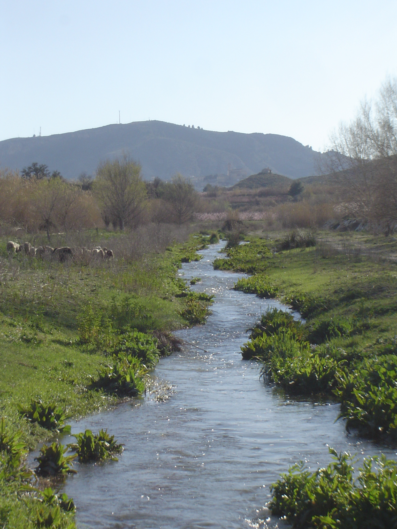 Río Argos a su paso por el termino municipal de Cehegín. Al fondo se puede ver la localidad de Cehegín